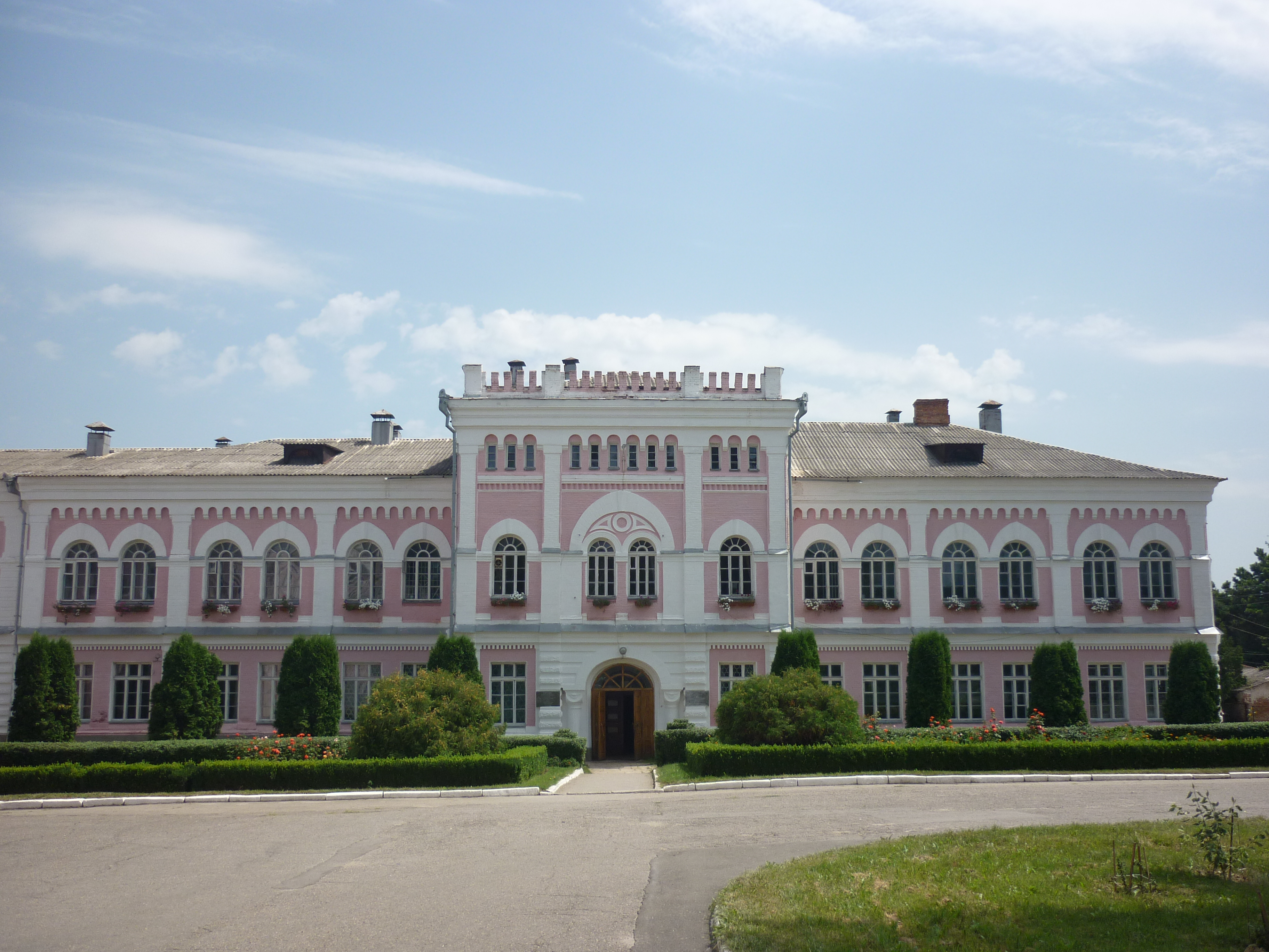 Уманський національний університет садівництва. Головний корпус, збудований в 1854 році, добудований в 1904 році